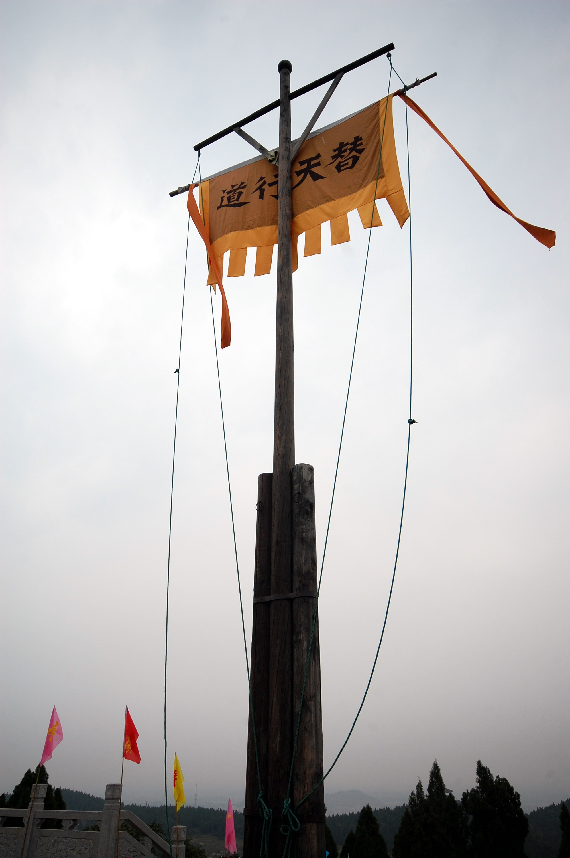 水泊梁山風景名勝区/水泊梁山风景名胜区